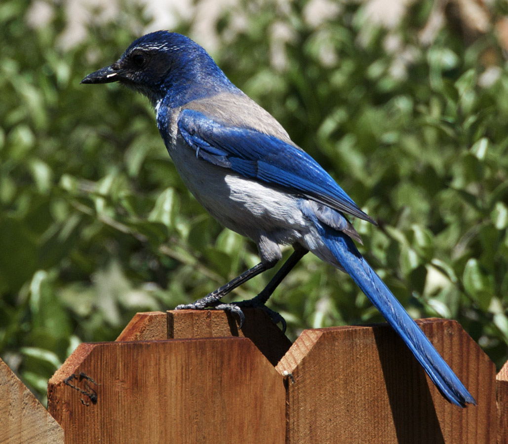 california scrub jay